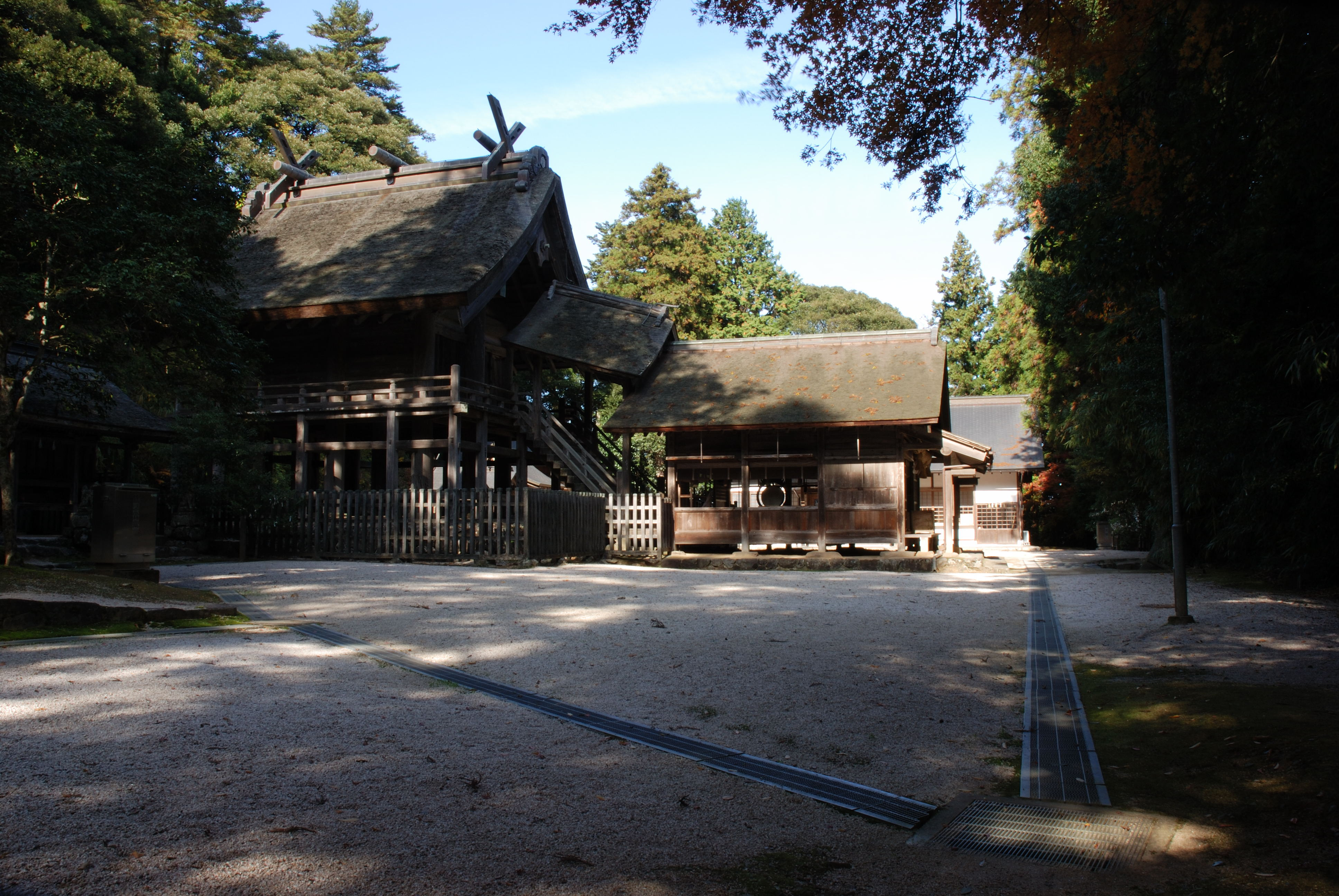 Kamosu jinja shaden